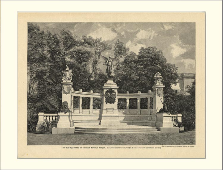 Holzstich zum Karl-Olga-Denkmal in Stuttgart